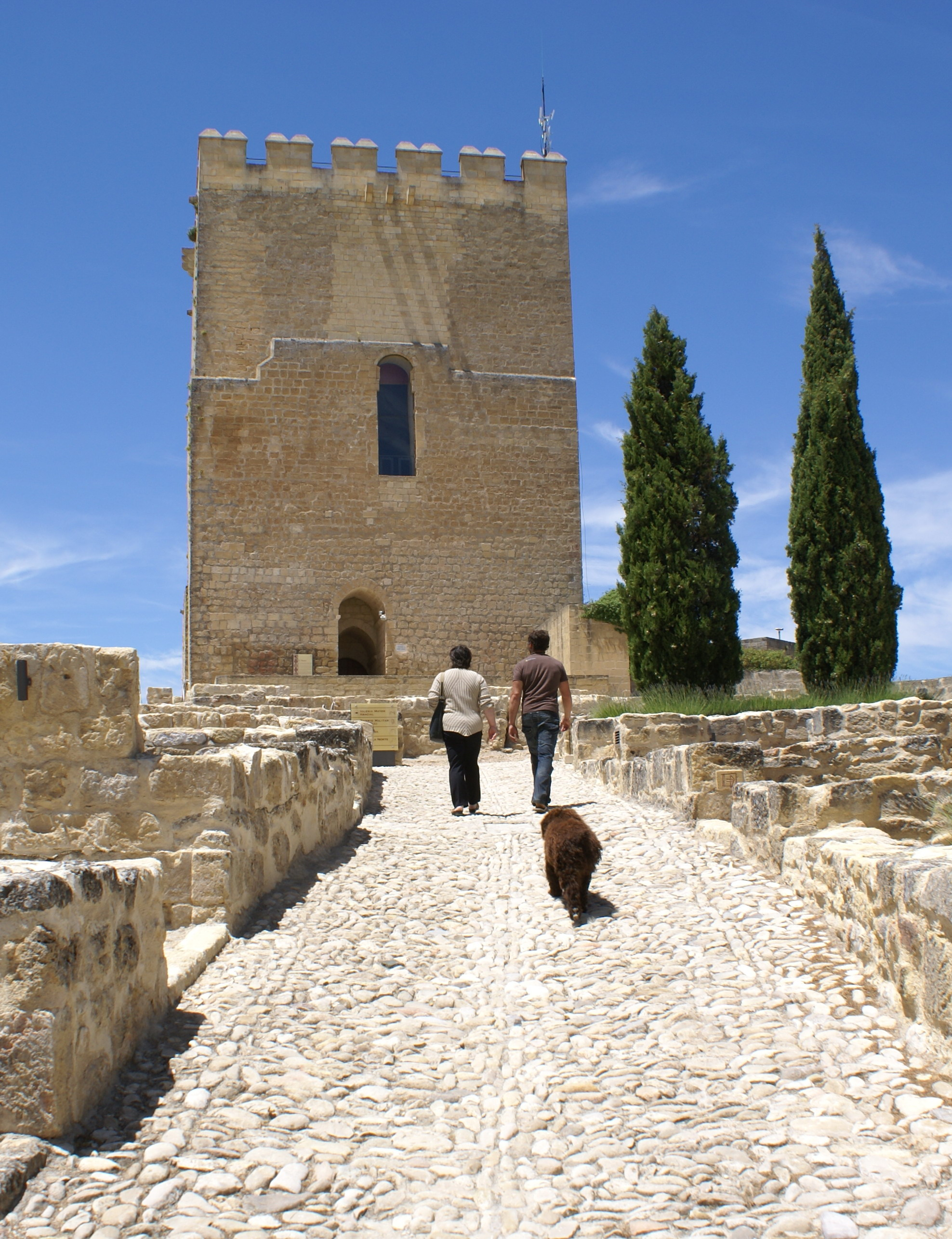 Torre del Homenaje en la Fortaleza de La Mota, Alcalá la Real , Jaen , España